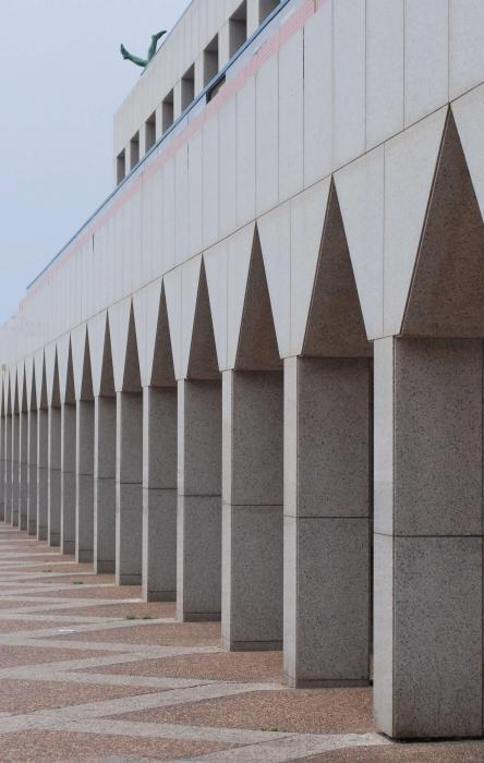 פיסה מהפסל מעל בית האופרה עם אלכסונים שמובילים לים